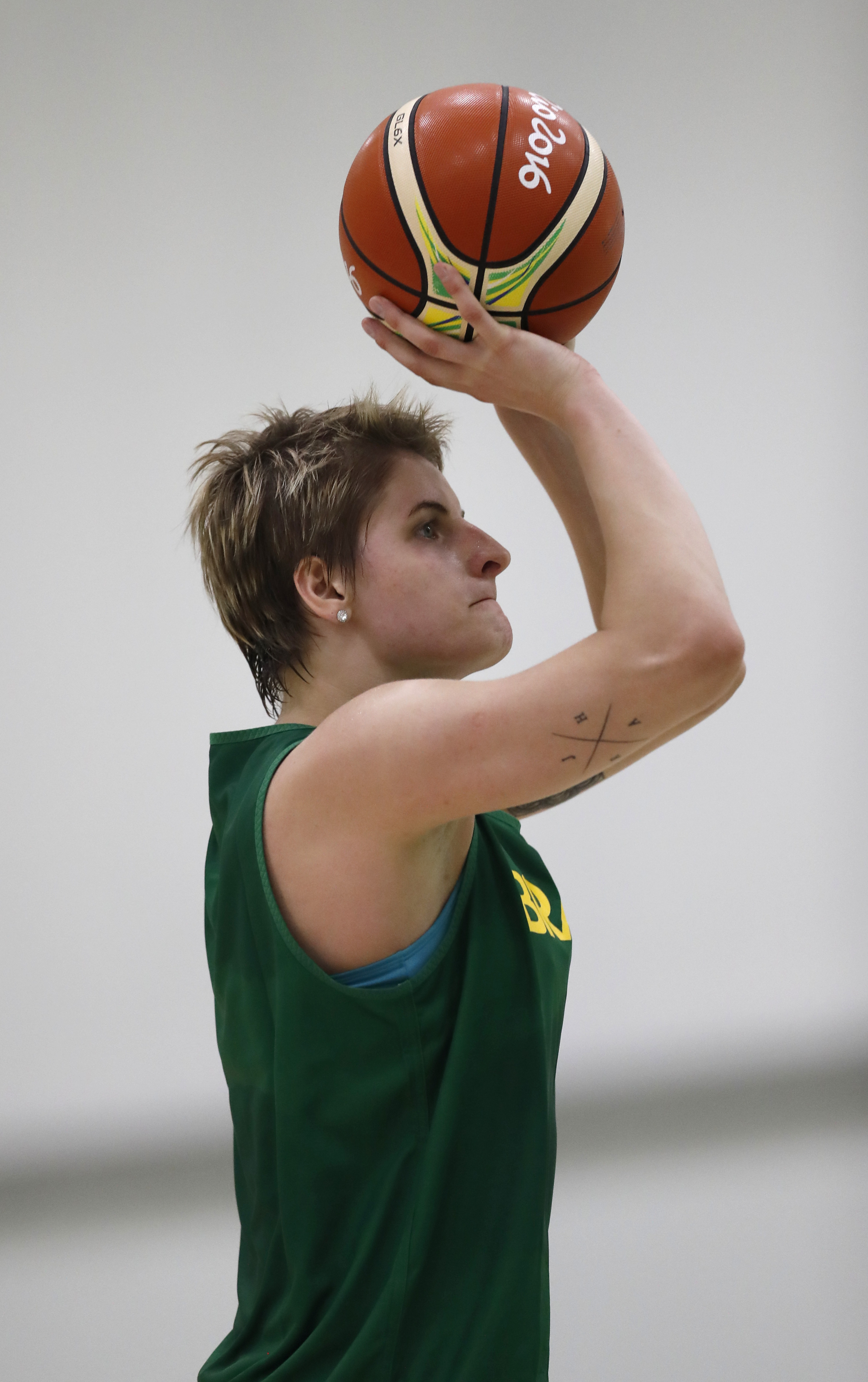 Rio de Janeiro - Equipe brasileira de basquete feminino treina pela primeira vez no Parque dos Atletas para os Jogos Olímpicos Rio 2016 (Fernando Frazão/Agência Brasil)